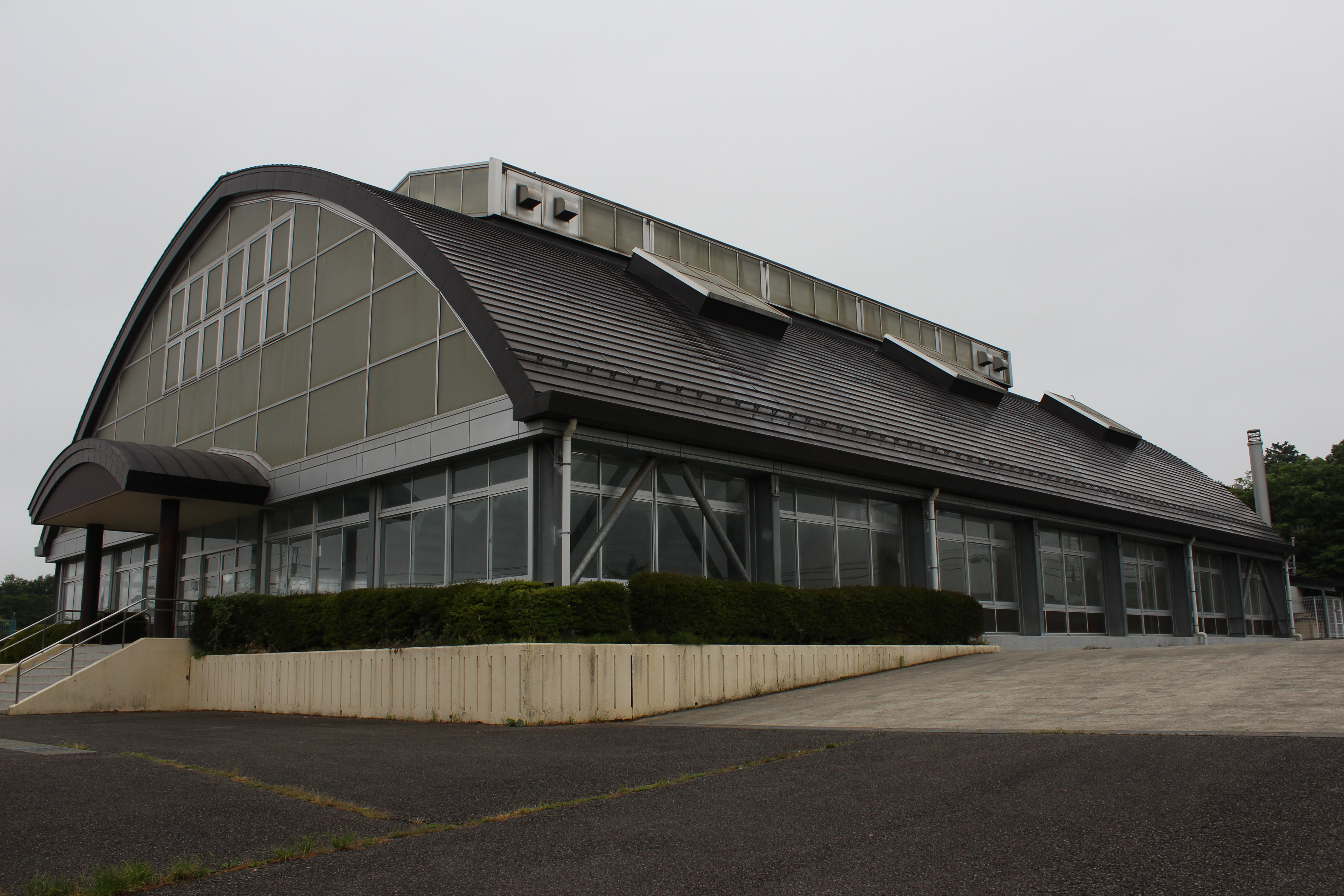 北杜市立高根西小学校上屋付屋外プール